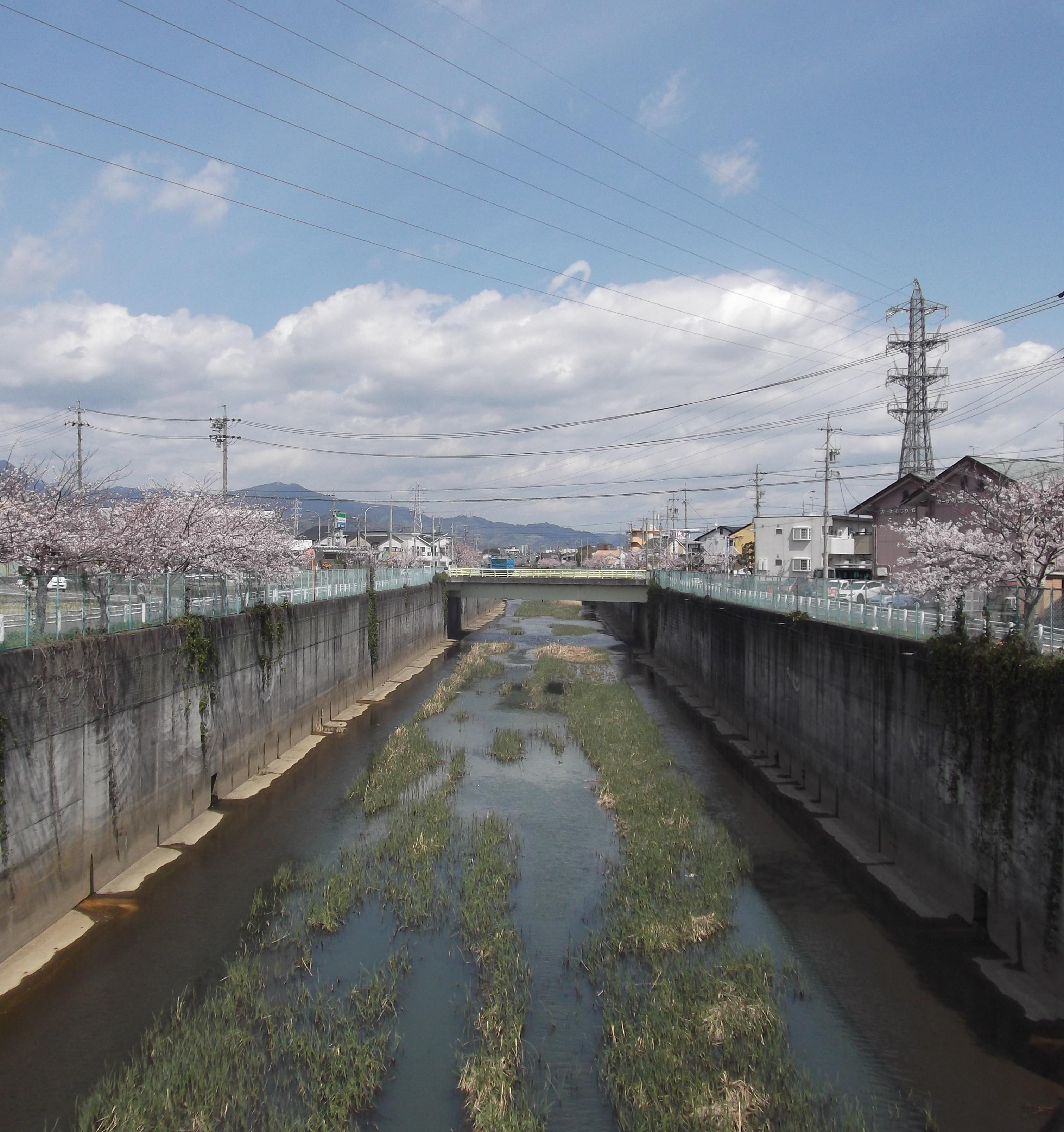 大谷川放水路。南小鹿橋を、一本下流側に掛かる橋から撮影。